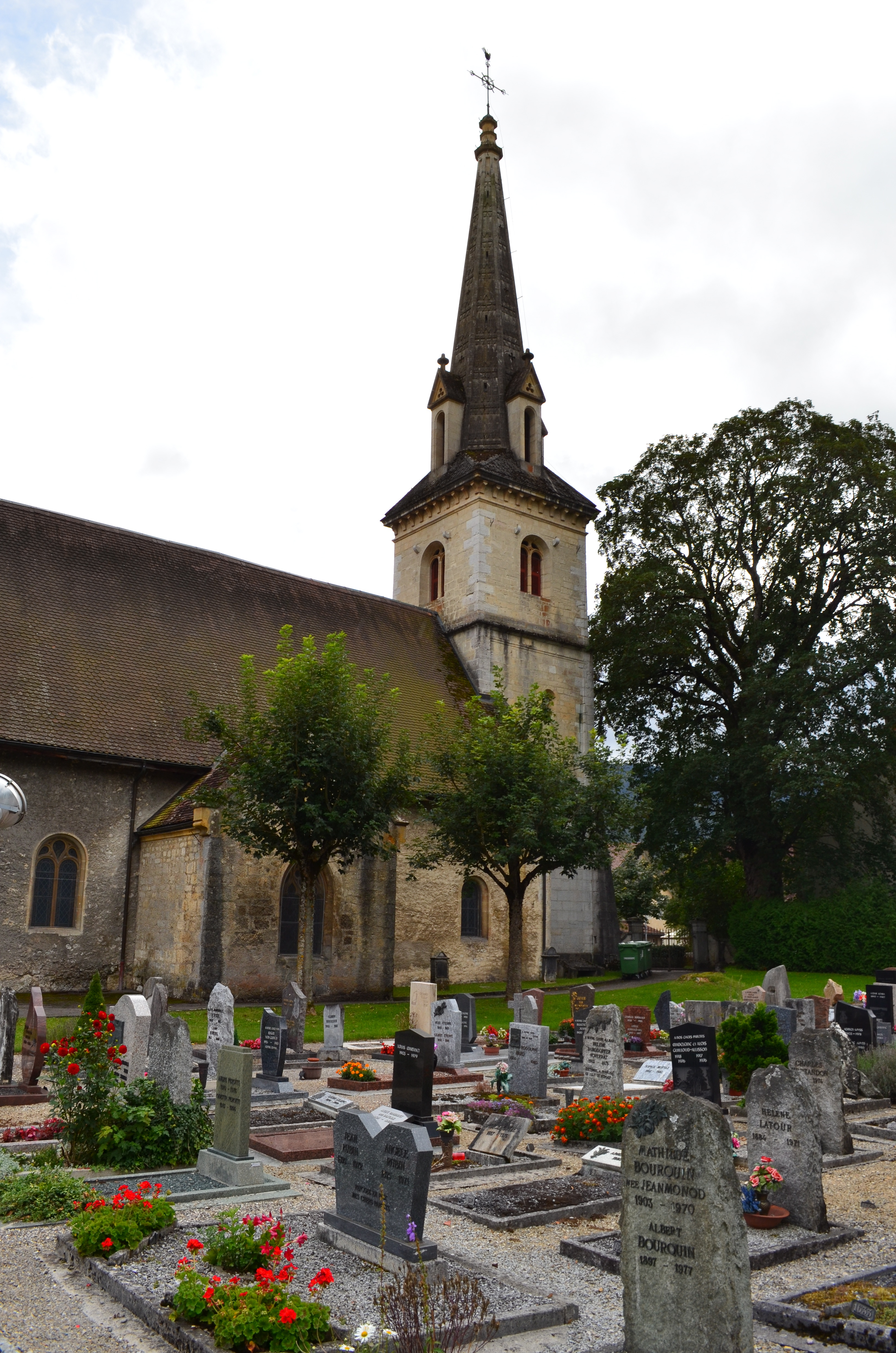 Le temple de Môtiers (NE) et son cimetière.